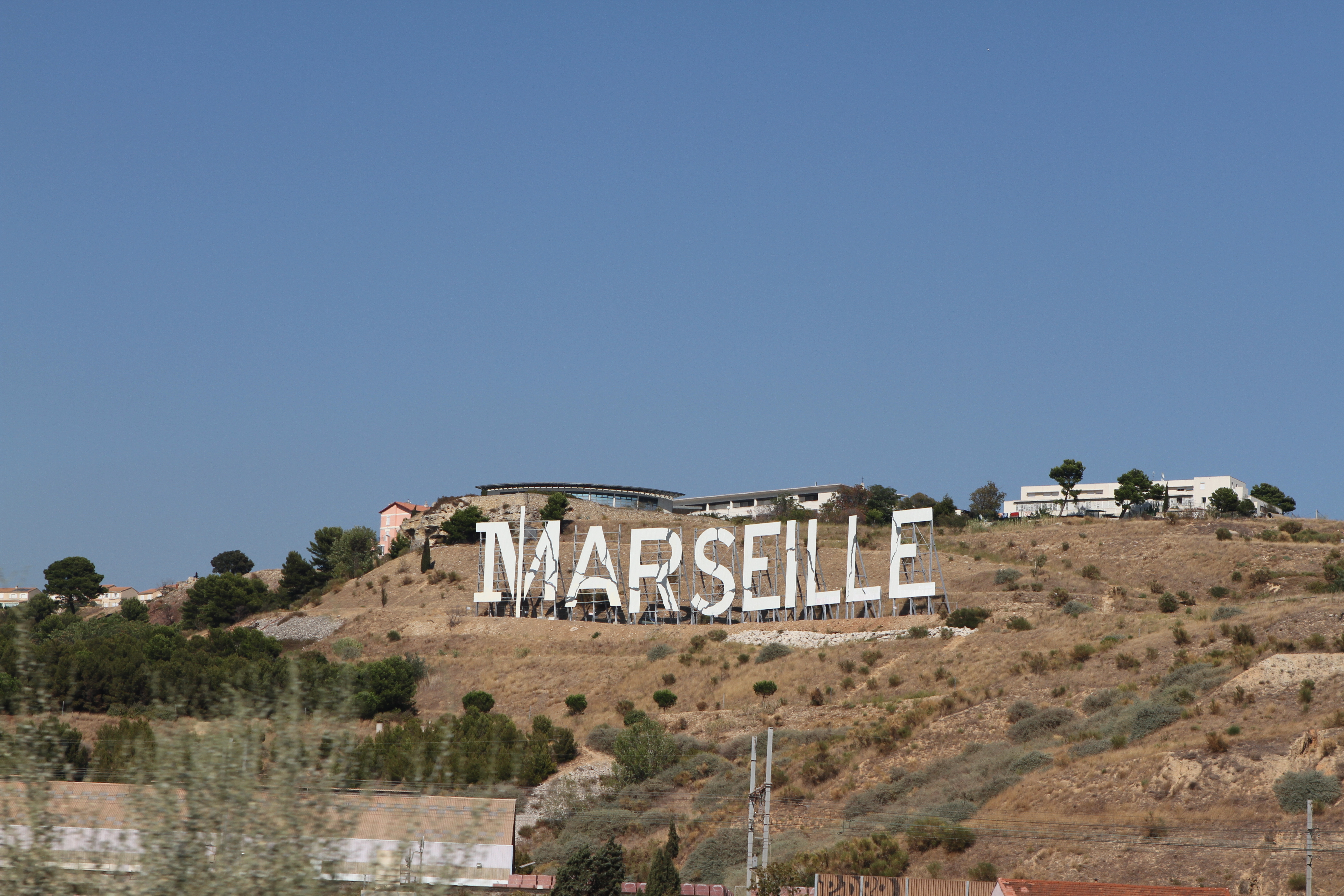 Panneau Marseille vu depuis l'autoroute A50. Ce dernier fut installé par la société Netflix à proximité du centre commercial Marseille Grand Littoral pour faire la promotion de la série télévisée Marseille.